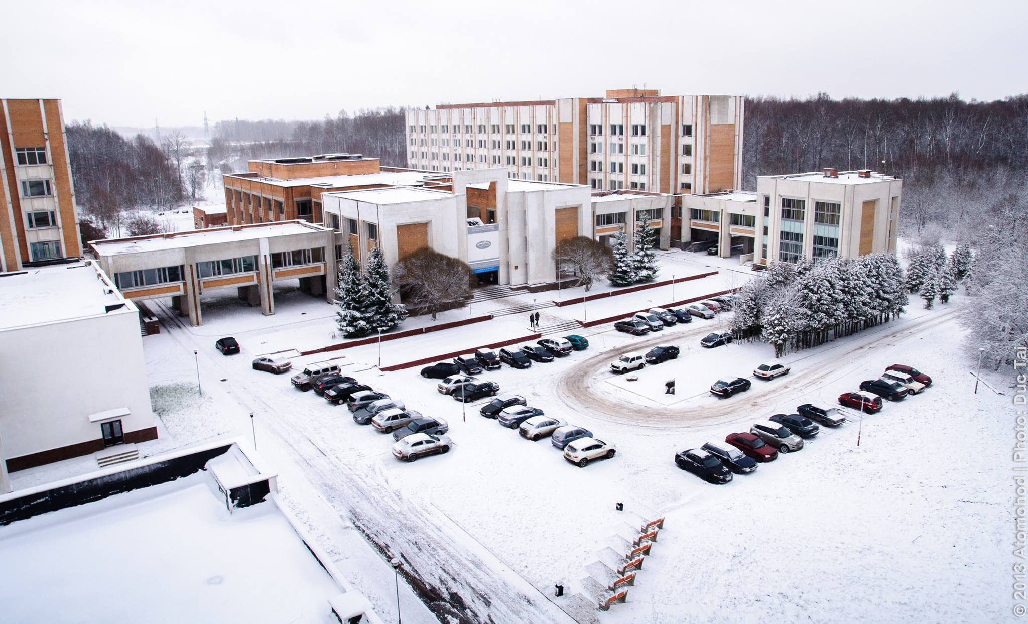 Truong IATE vao mua dong